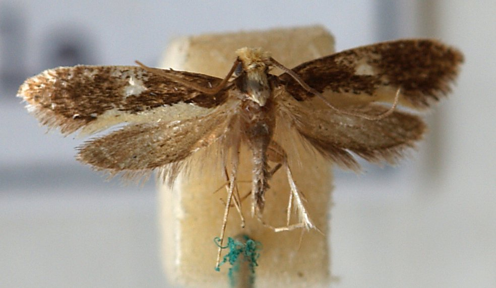 Blabophanes ferruginella = Monopis obviella